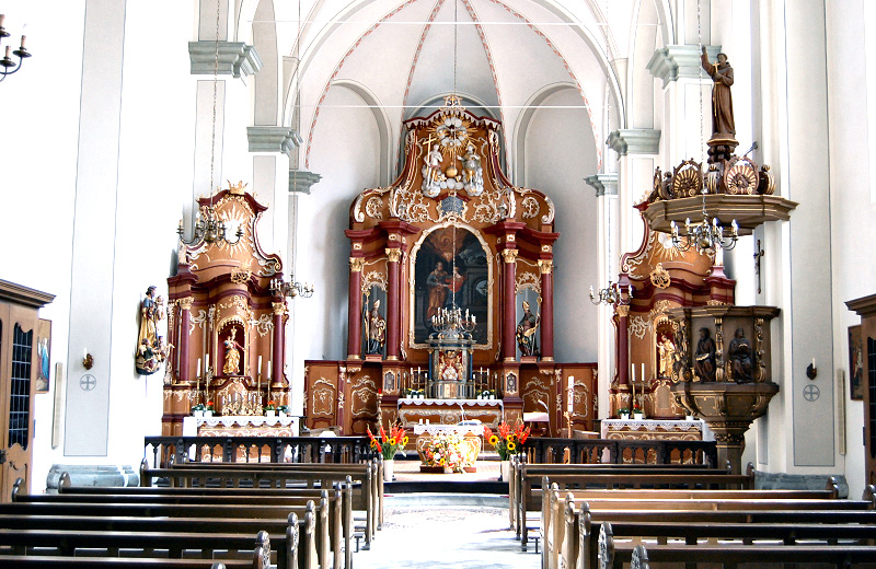 Alte Wallfahrtskirche in Werl Innenansicht